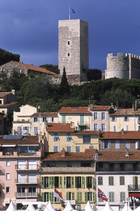 batiments du musée de la Castre